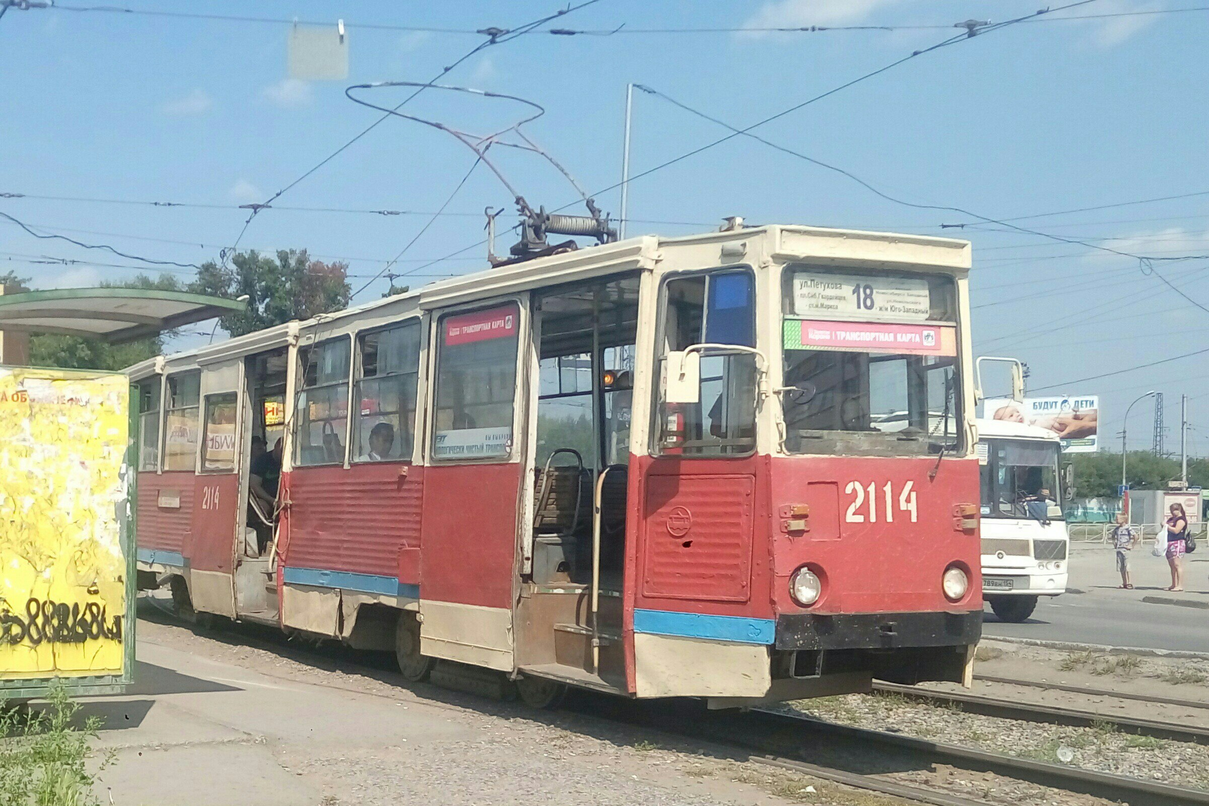 Трамвай 71-605 №2114 в Новосибирске на 18-м маршруте